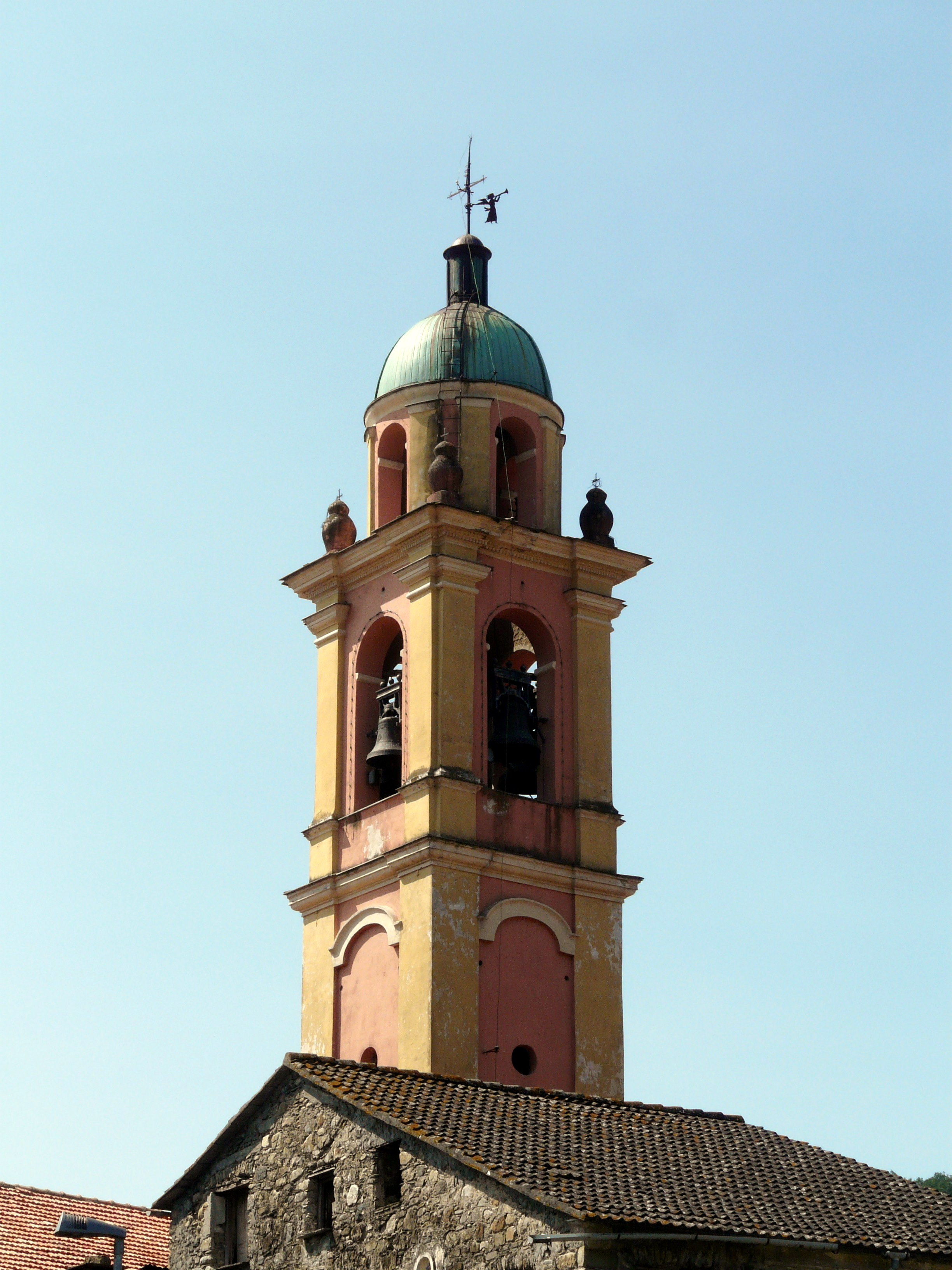 Campanile della chiesa di San Pietro apostolo, San Pietro Vara, Varese Ligure, Liguria, Italia